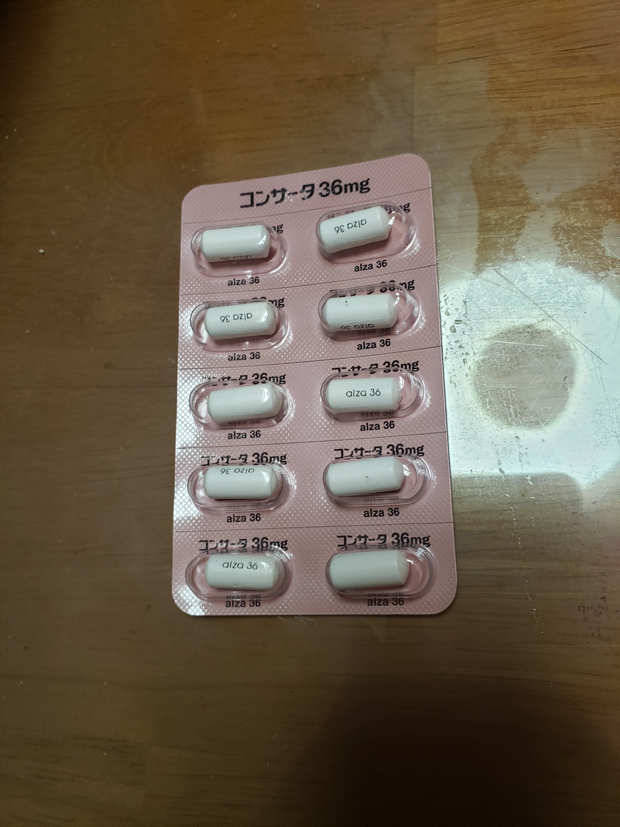 コンサータカプセル（36mg） 投降者本人に対する処方薬